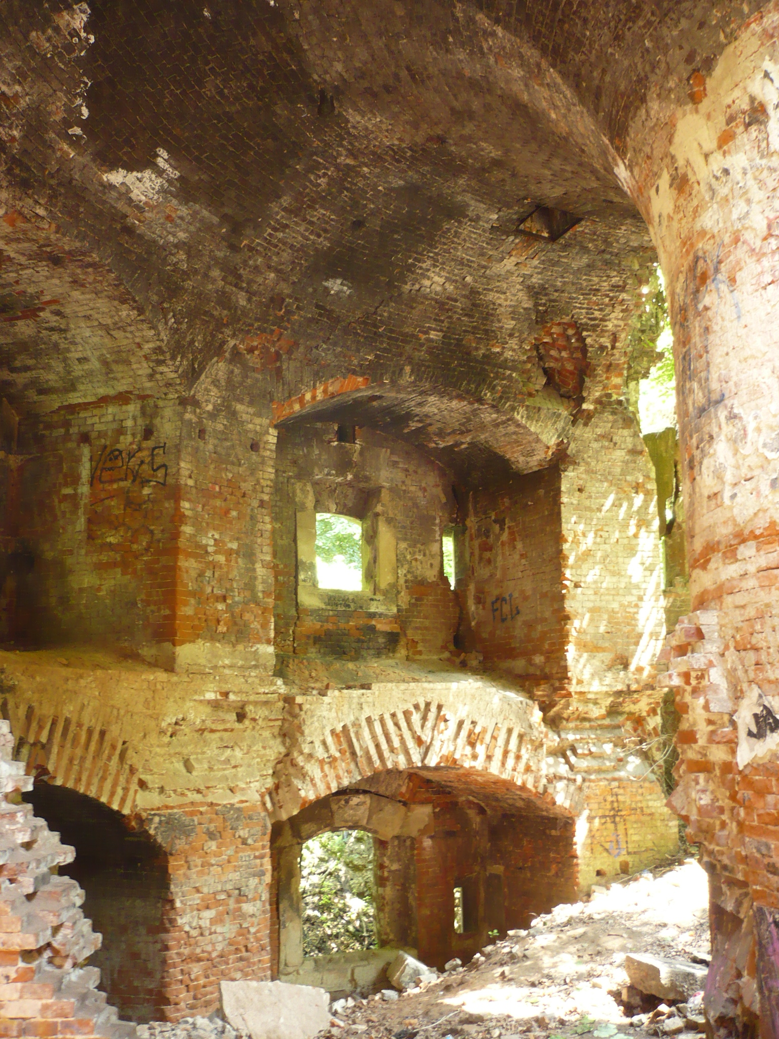 Lwów - wnętrze bastionu cytadeli